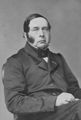 Portretfoto van Franciscus Bernardus Hubertus Michiels van Kessenich